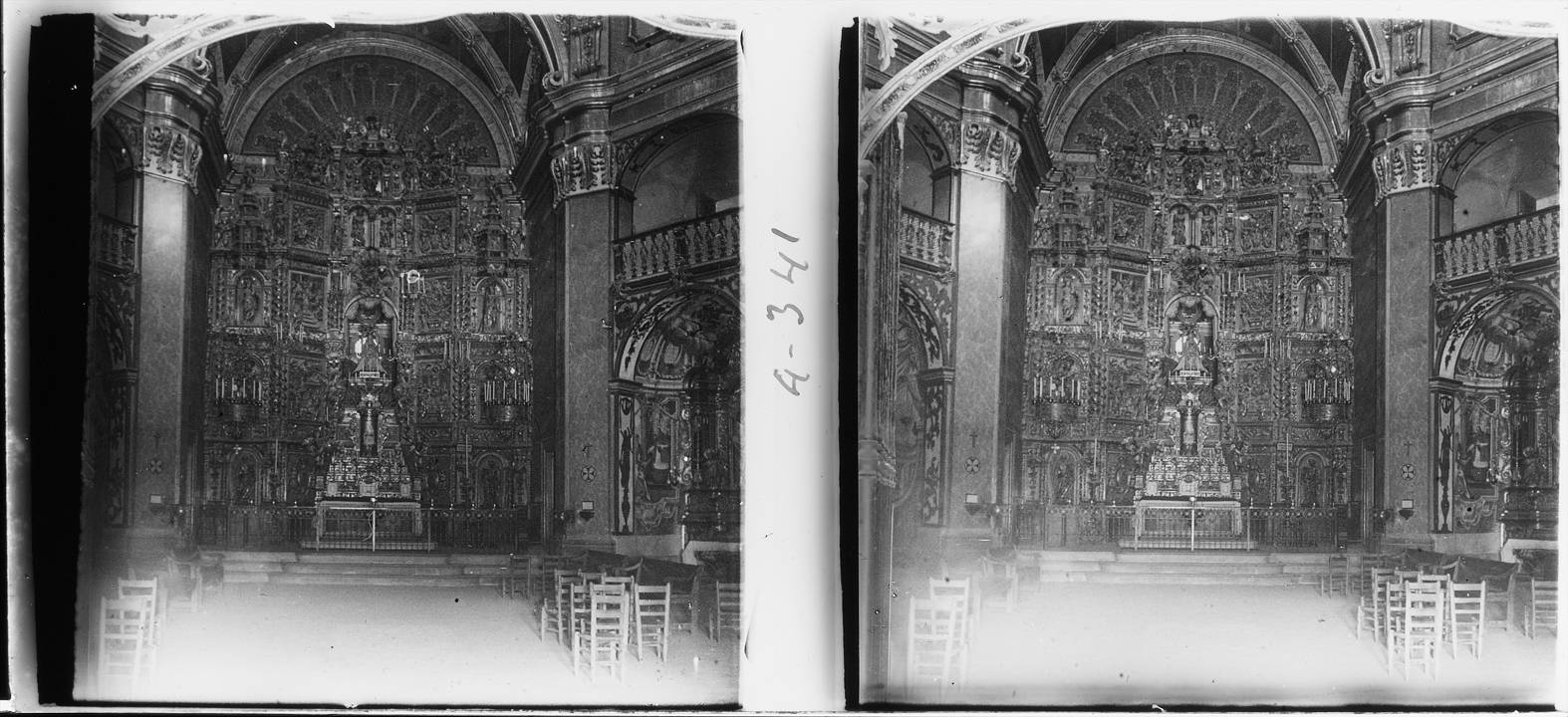 Altar major del santuari de la Gleva. Josep Salvany i Blanch (1916)